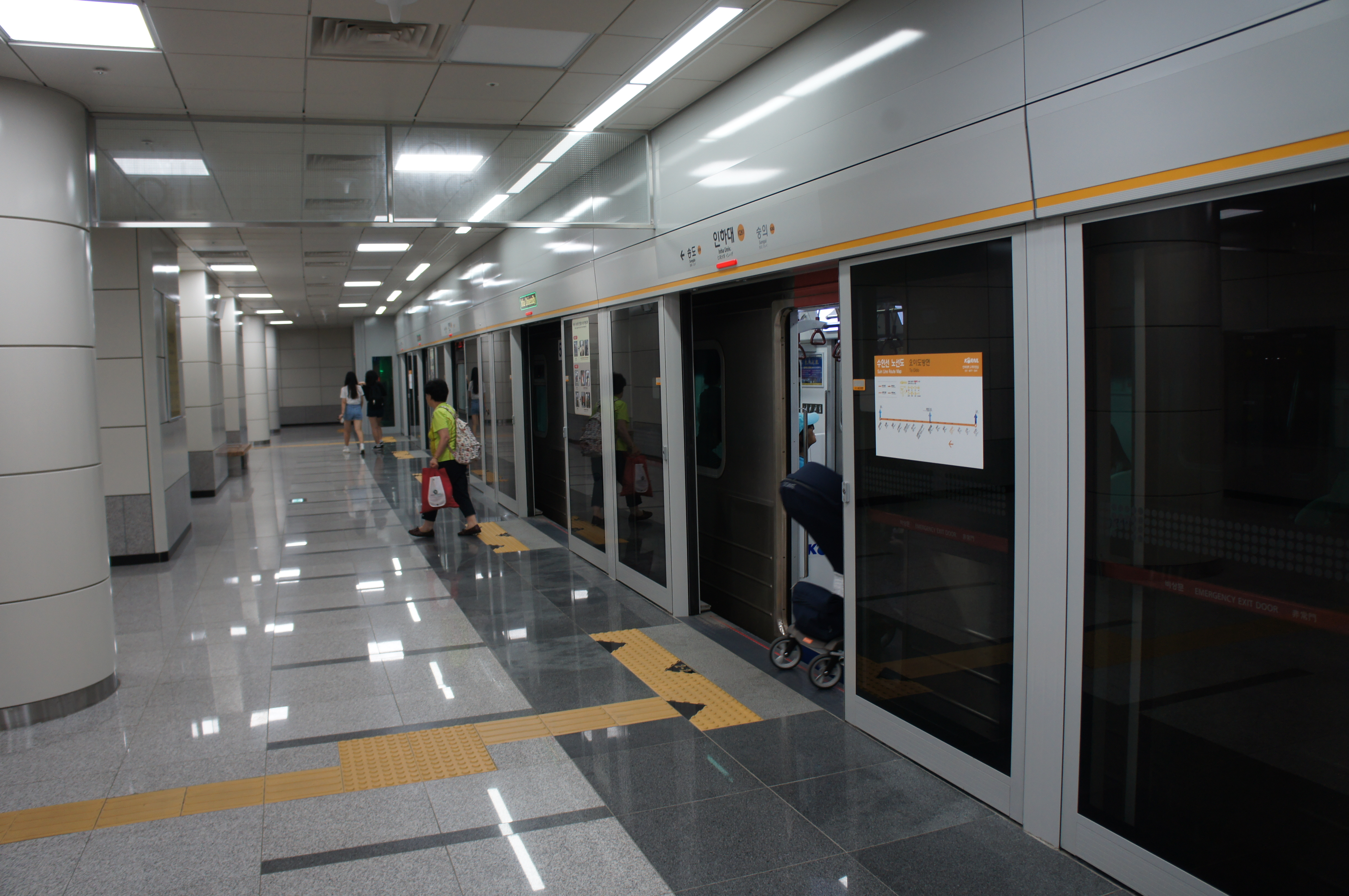 인하대역 승강장